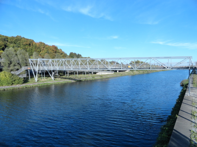 Fussgängerbrücke über den Europakanal in Regensburg auf Höhe der Donau-Staustufe